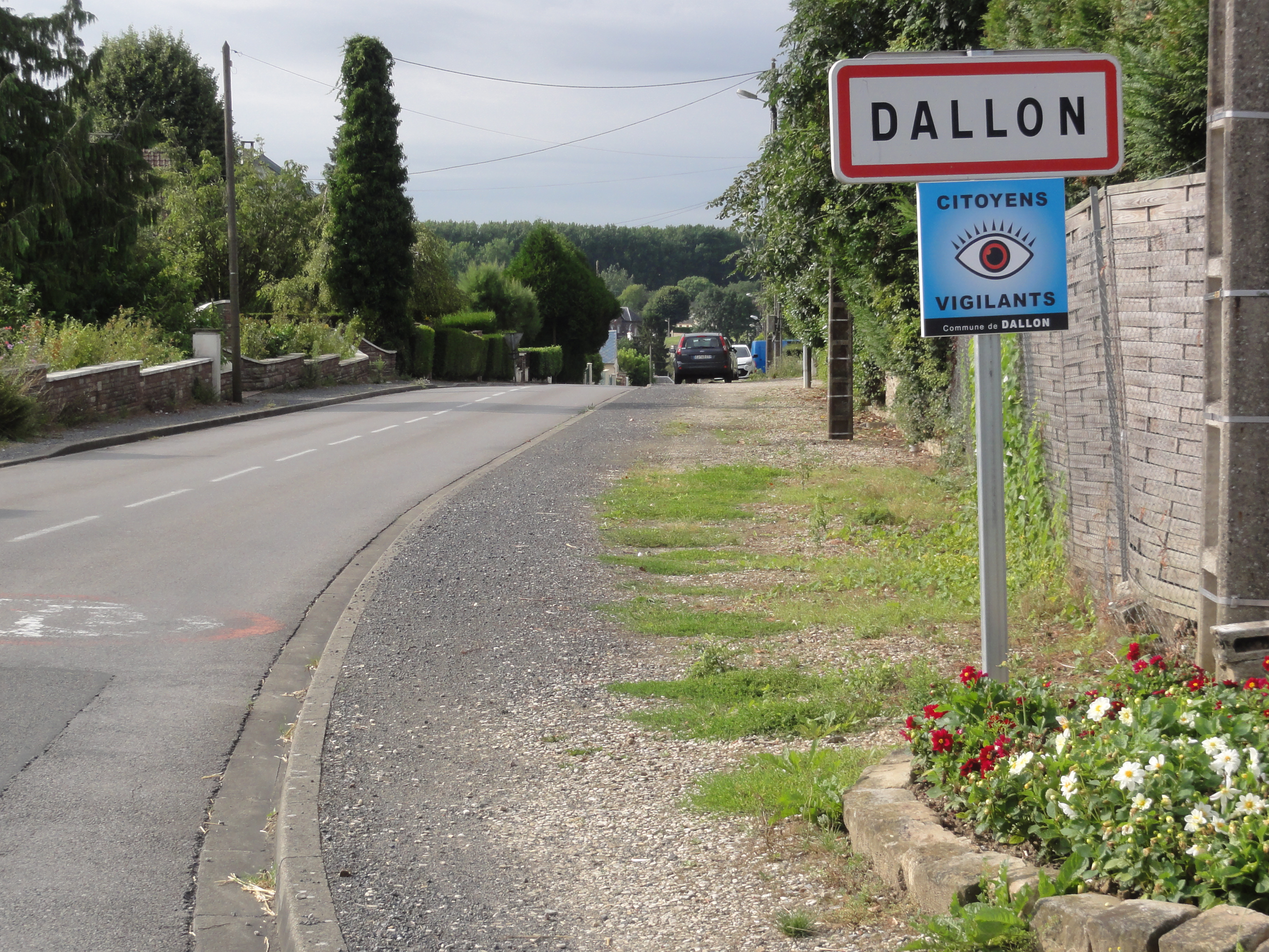 Dallon (Aisne) city limit sign